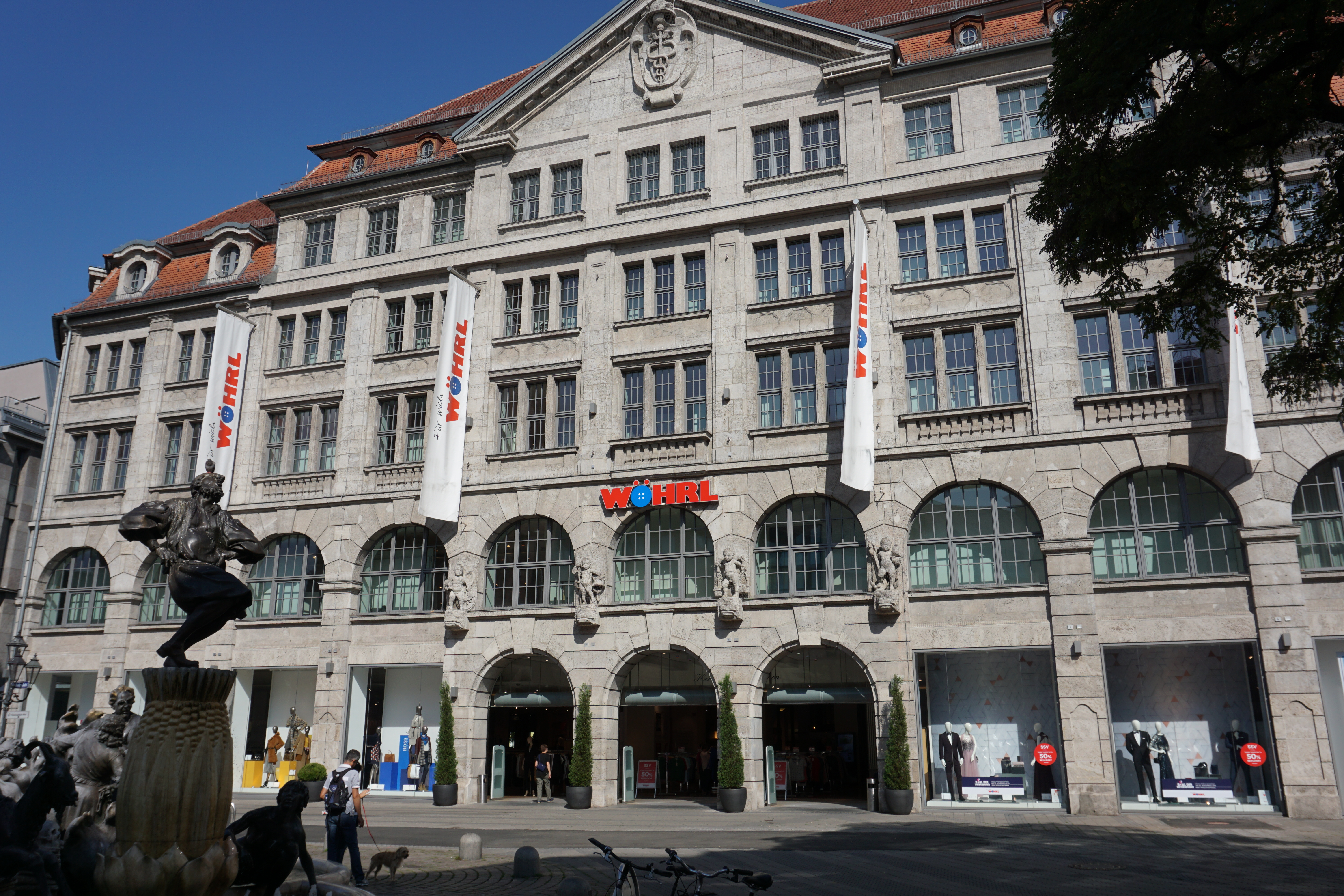 WÖHRL Haus Nürnberg Außenfassade